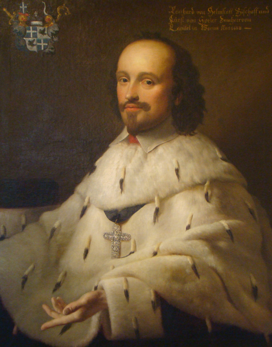 Reinhard von Helmstatt. Das wohl im 19. Jhd. gemalte Porträt zeigt ihn angeblich im Jahr 1438